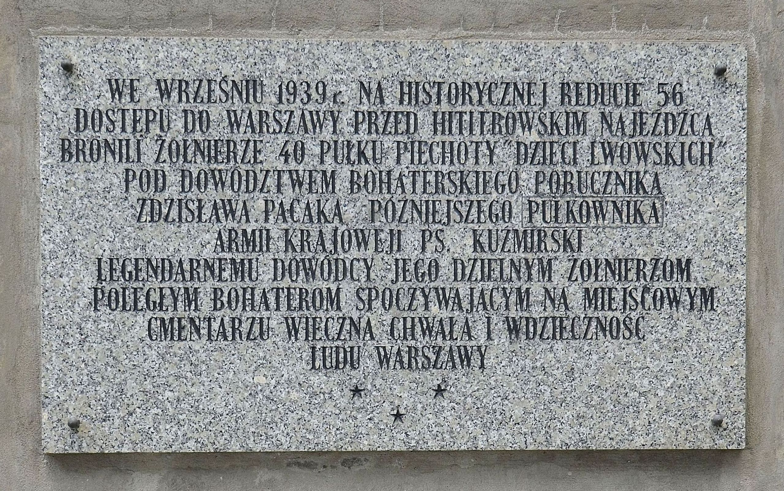 Tablica upamiętniająca żołnierzy 40 pułku piechoty „Dzieci Lwowskich" na bocznej ścianie kościoła św. Wawrzyńca w Warszawie